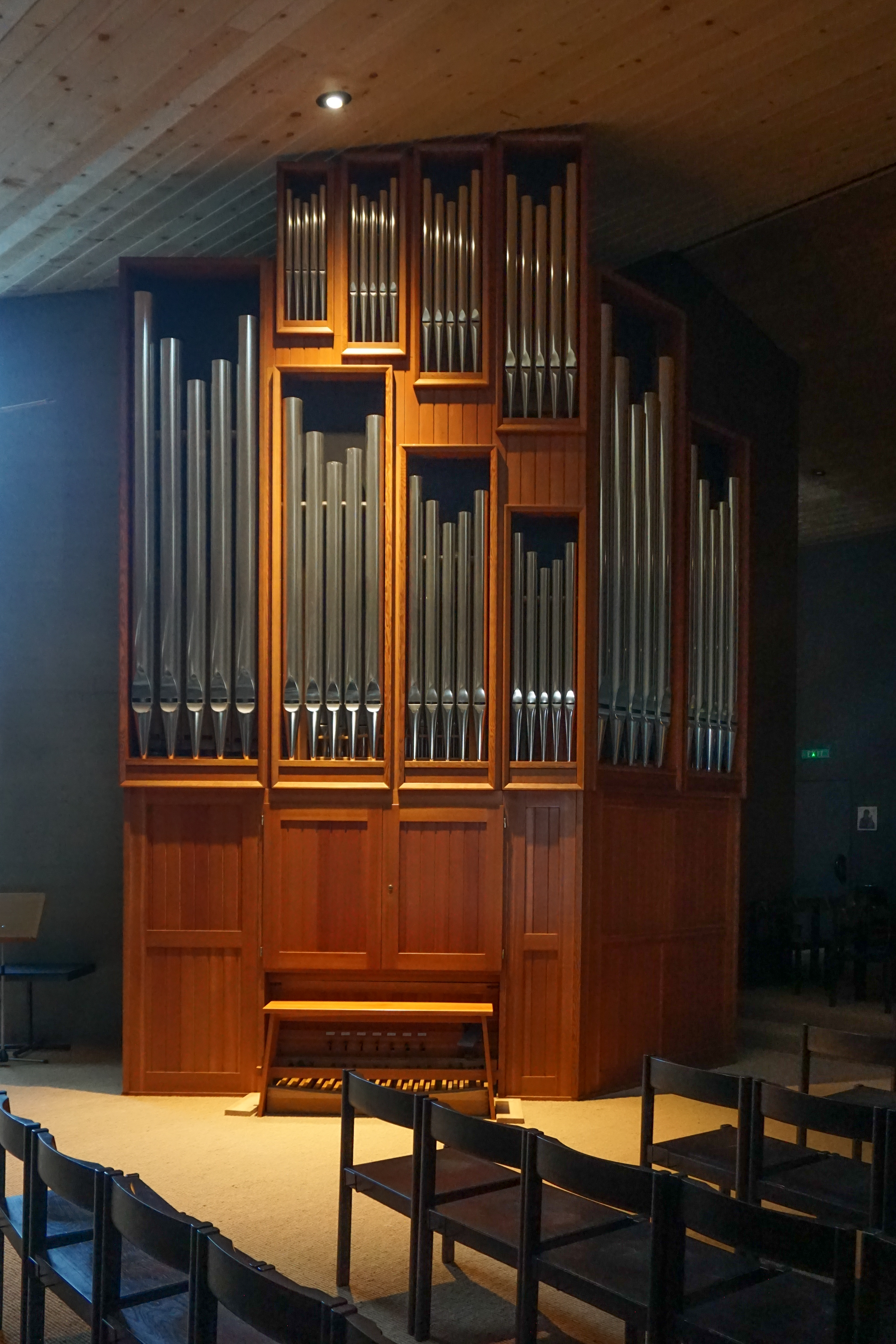 Bruder Klaus Kirche Spiez, Orgel von Füglister 1981.